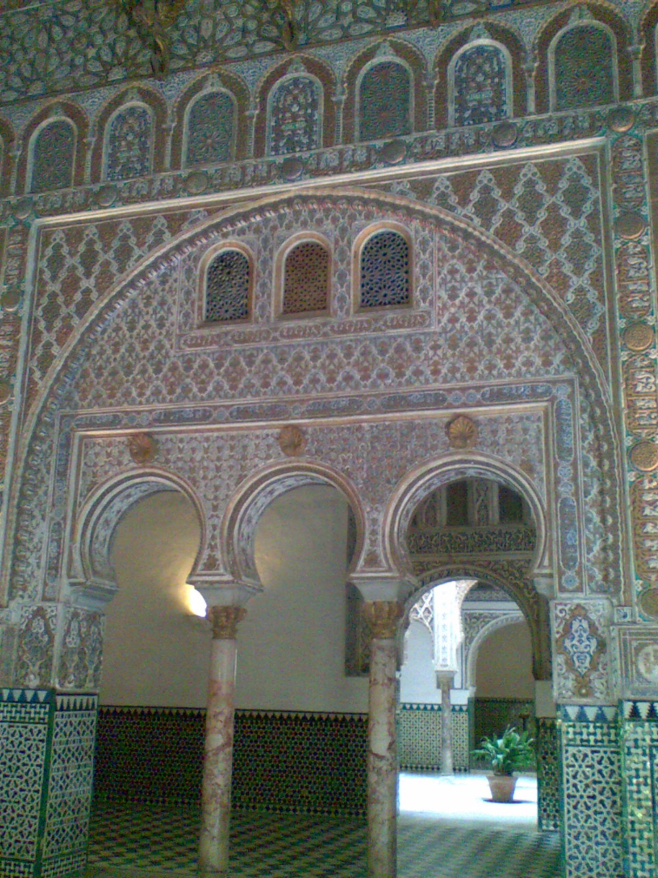 Alcázar ( Sevilal)